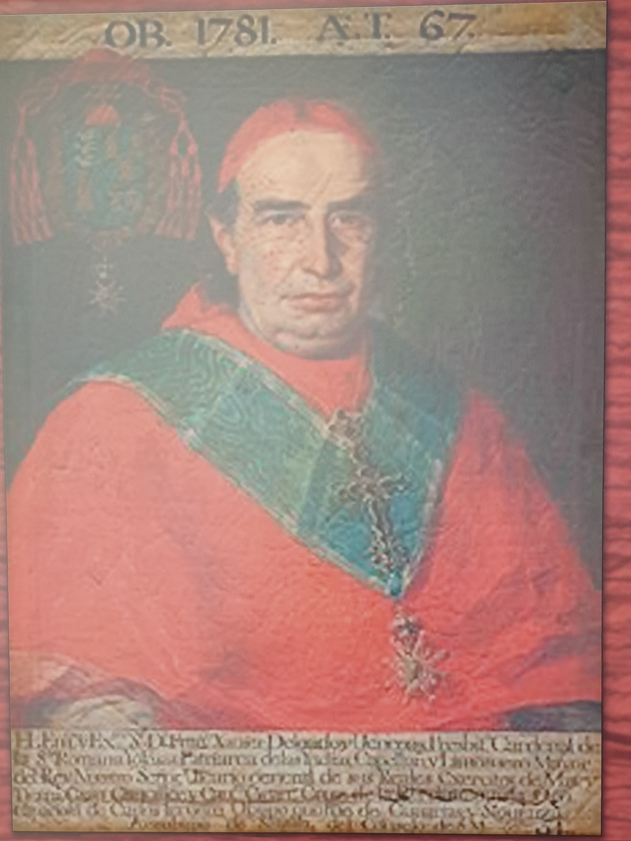 Cardenal Delgado y Venegas. Lienzo.